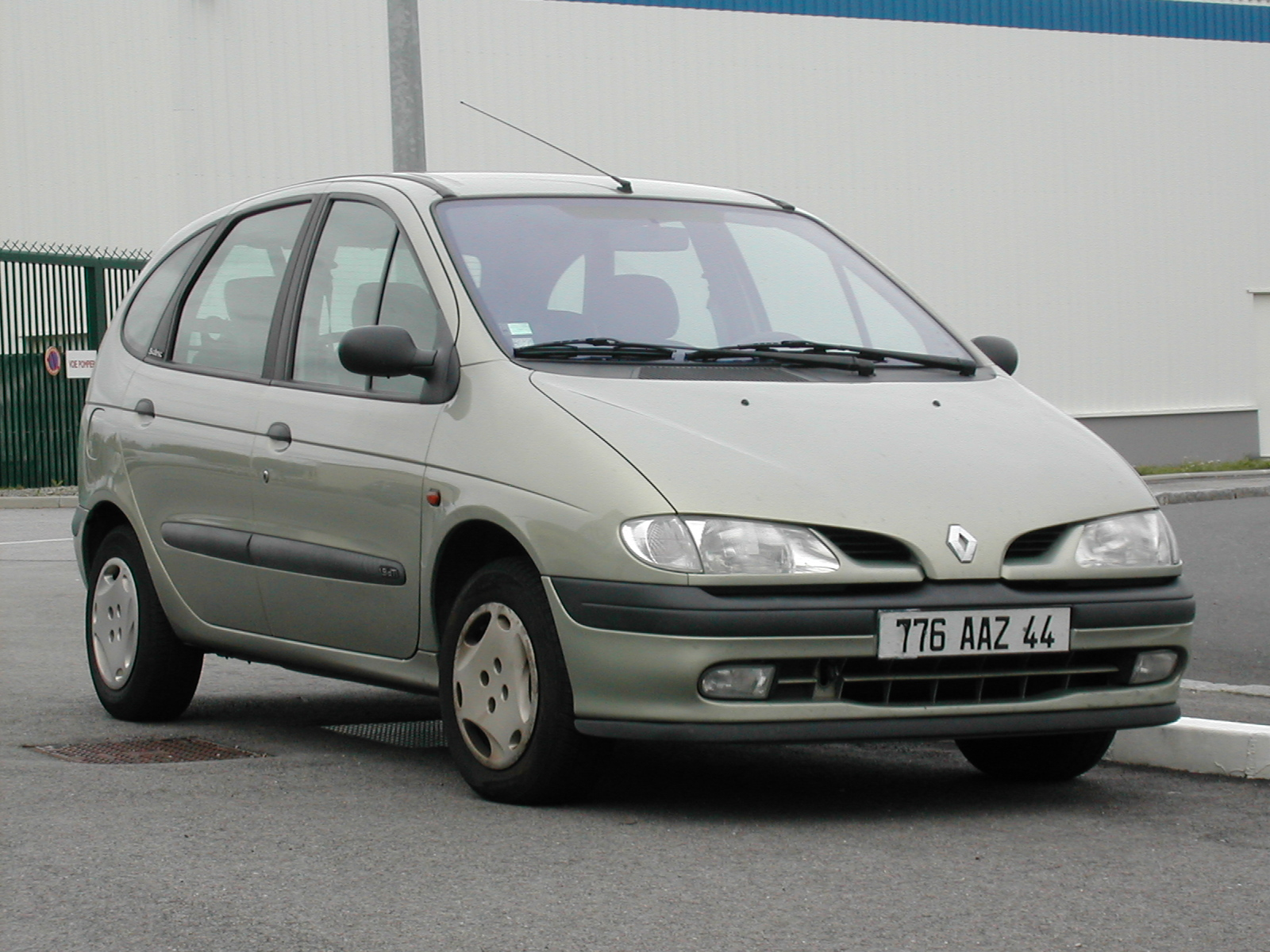 Photo personnel prise par l'auteur le 15 septembre 2006...